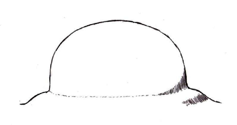 Butkara stupa during the Maurya period. Personal drawing. Reference: Facenna, Butkara I